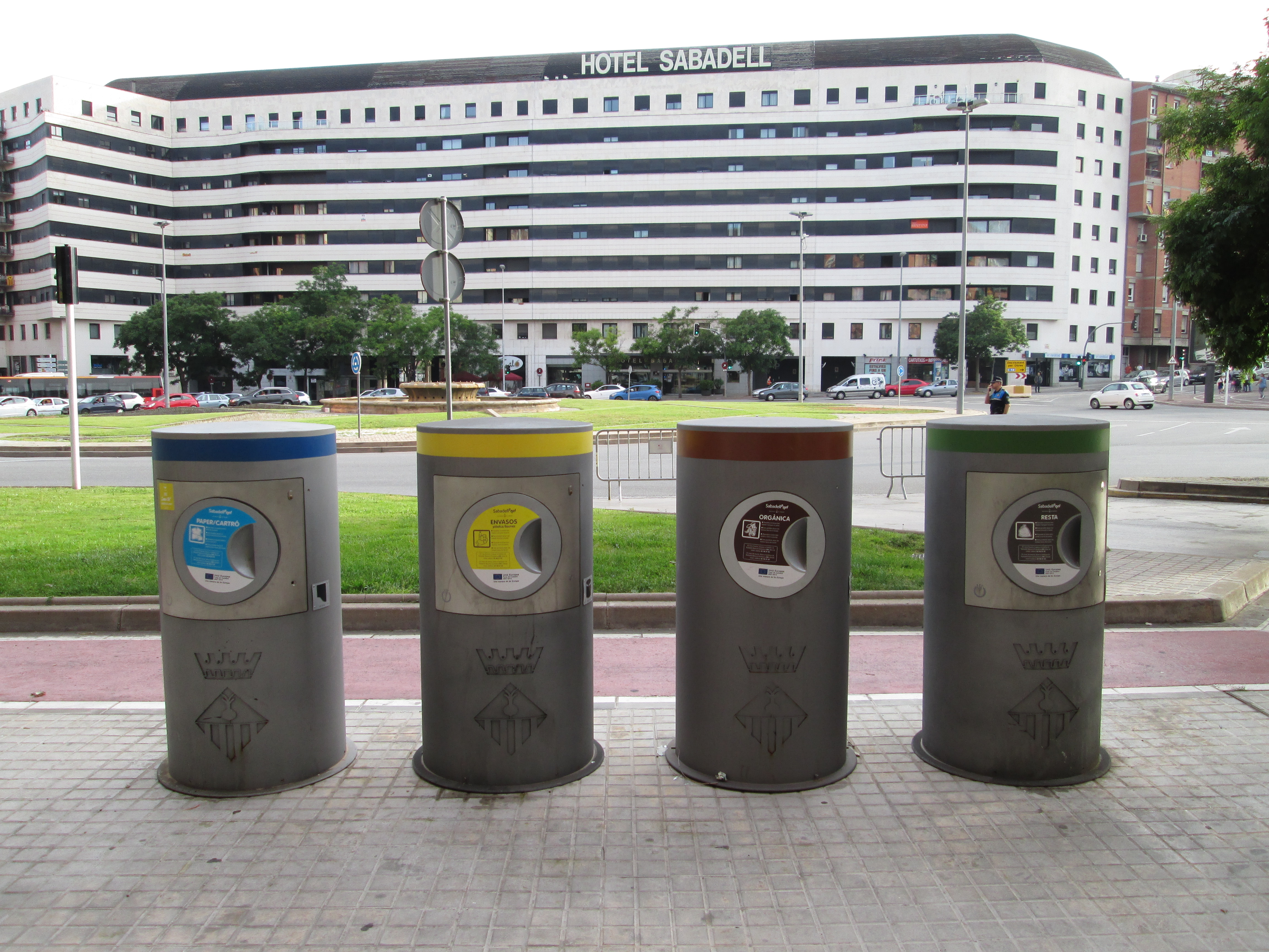 Sistema de recogida neumática de basura de Sabadell. Recogida selectiva: - Buzón azul: papel / cartón. - Buzón amarillo: envases (plásticos / latas). - Buzón marrón: orgánica. - Buzón verde: resto.